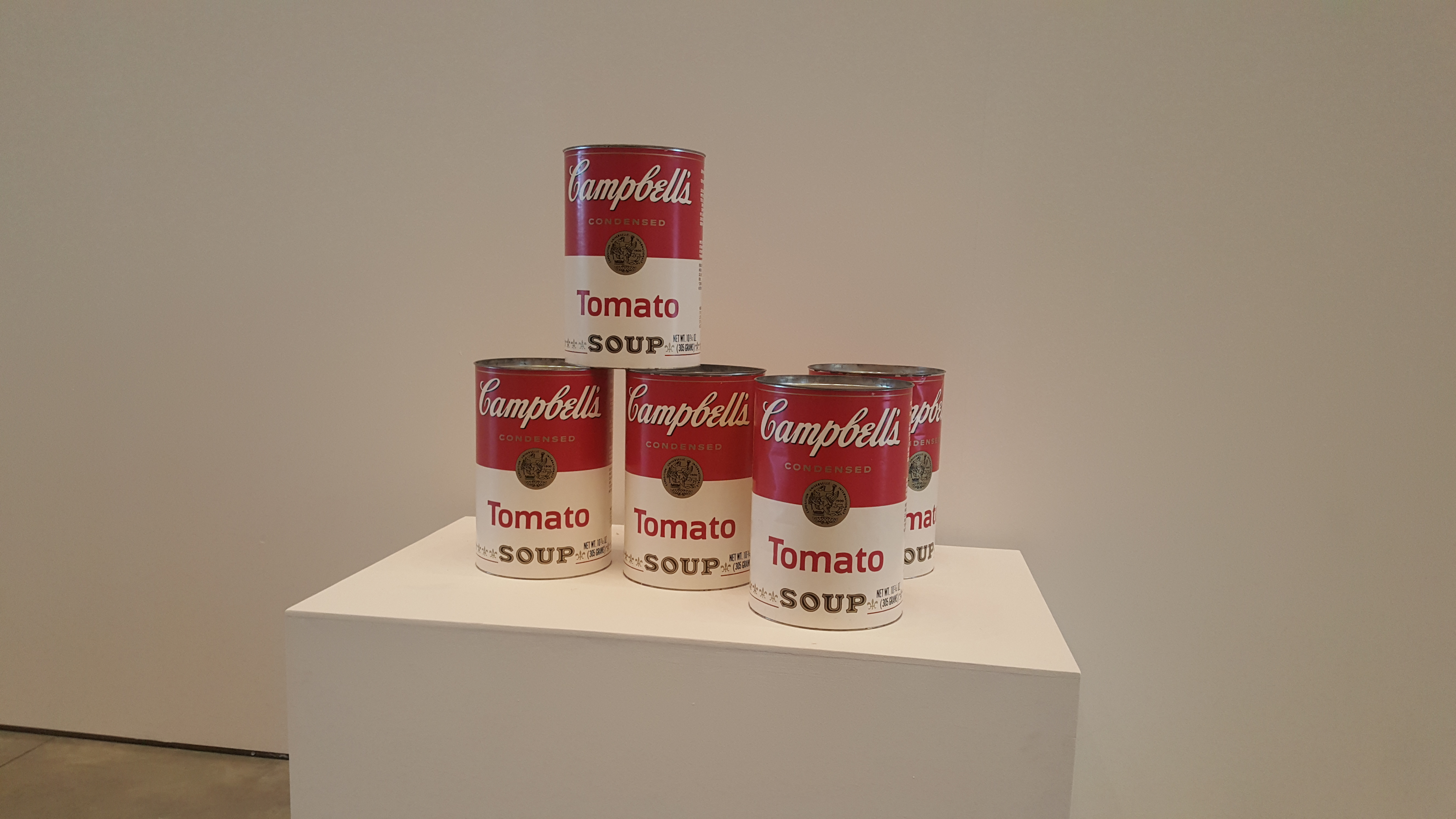 2017년 1월 대구미술관의 캠벨수프캔